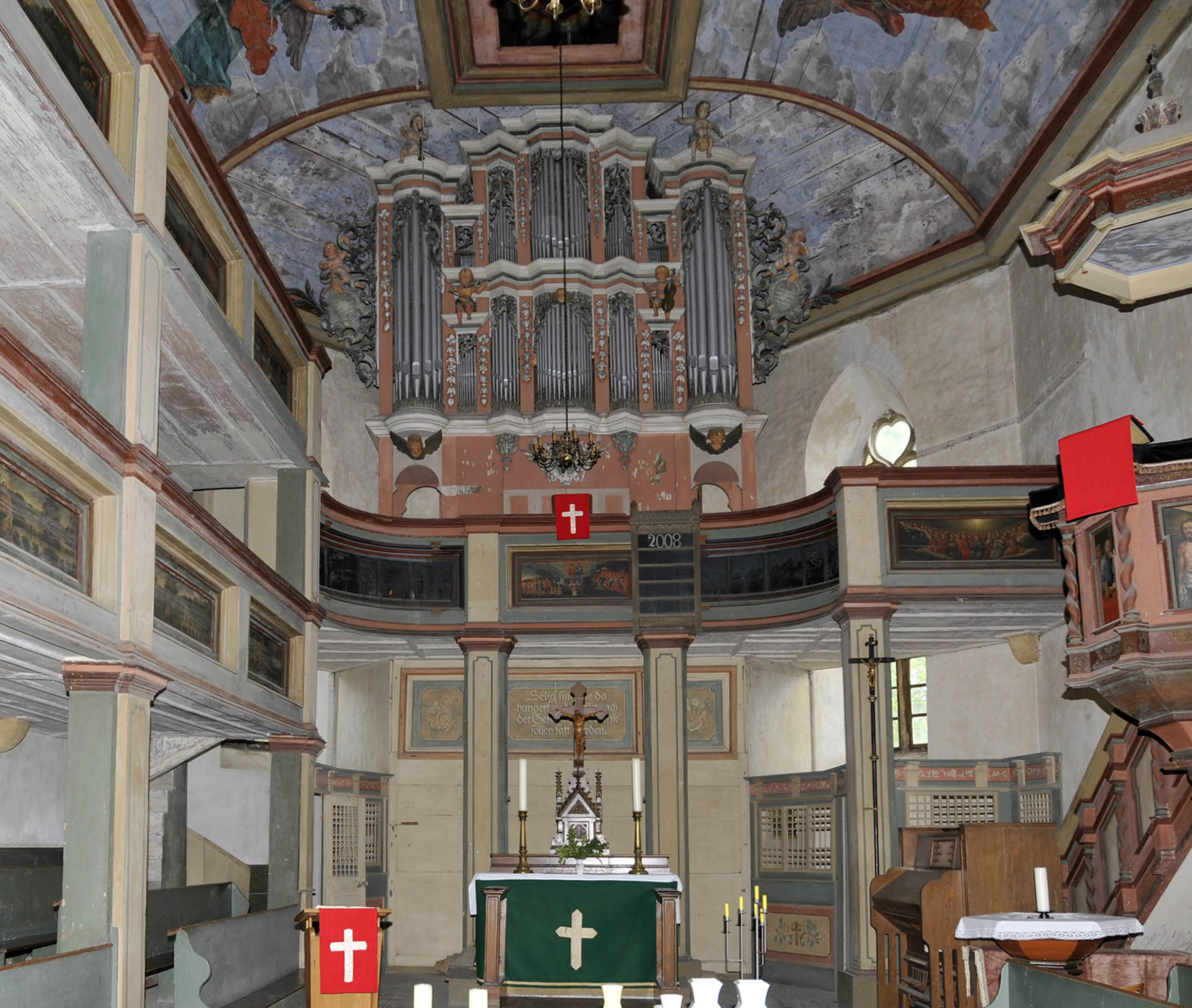 Inneres der Kirche von Grabsleben, Schmaltz-Orgel